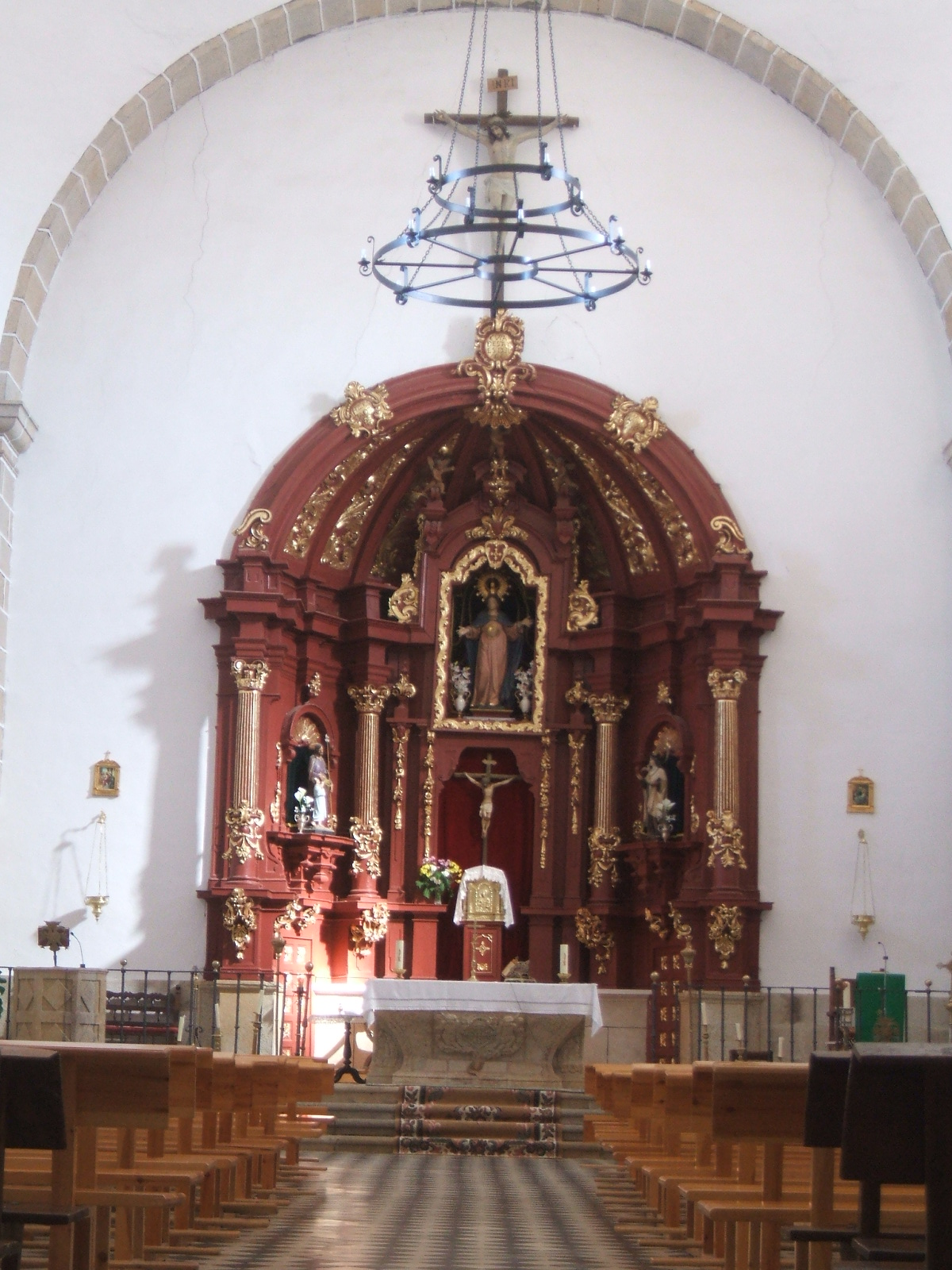 En Navas del Madroño (Cáceres, España), la iglesia parroquial luce en su altar mayor un retablo barroco de Juan Grande de Vegas.